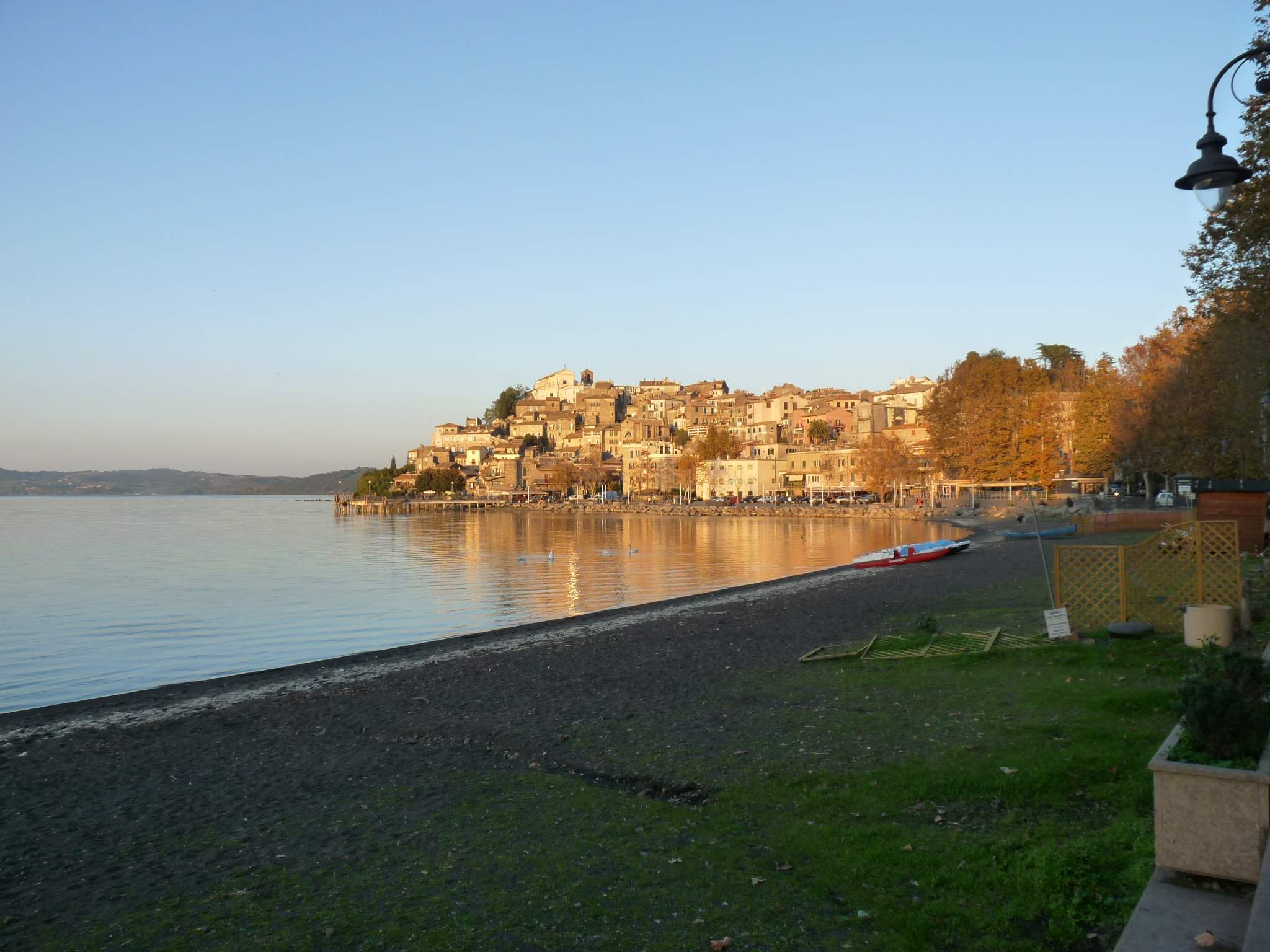 Vista di Angiullara Sabazia